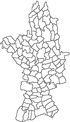 Categorie:Hărţi ale judeţului Olt